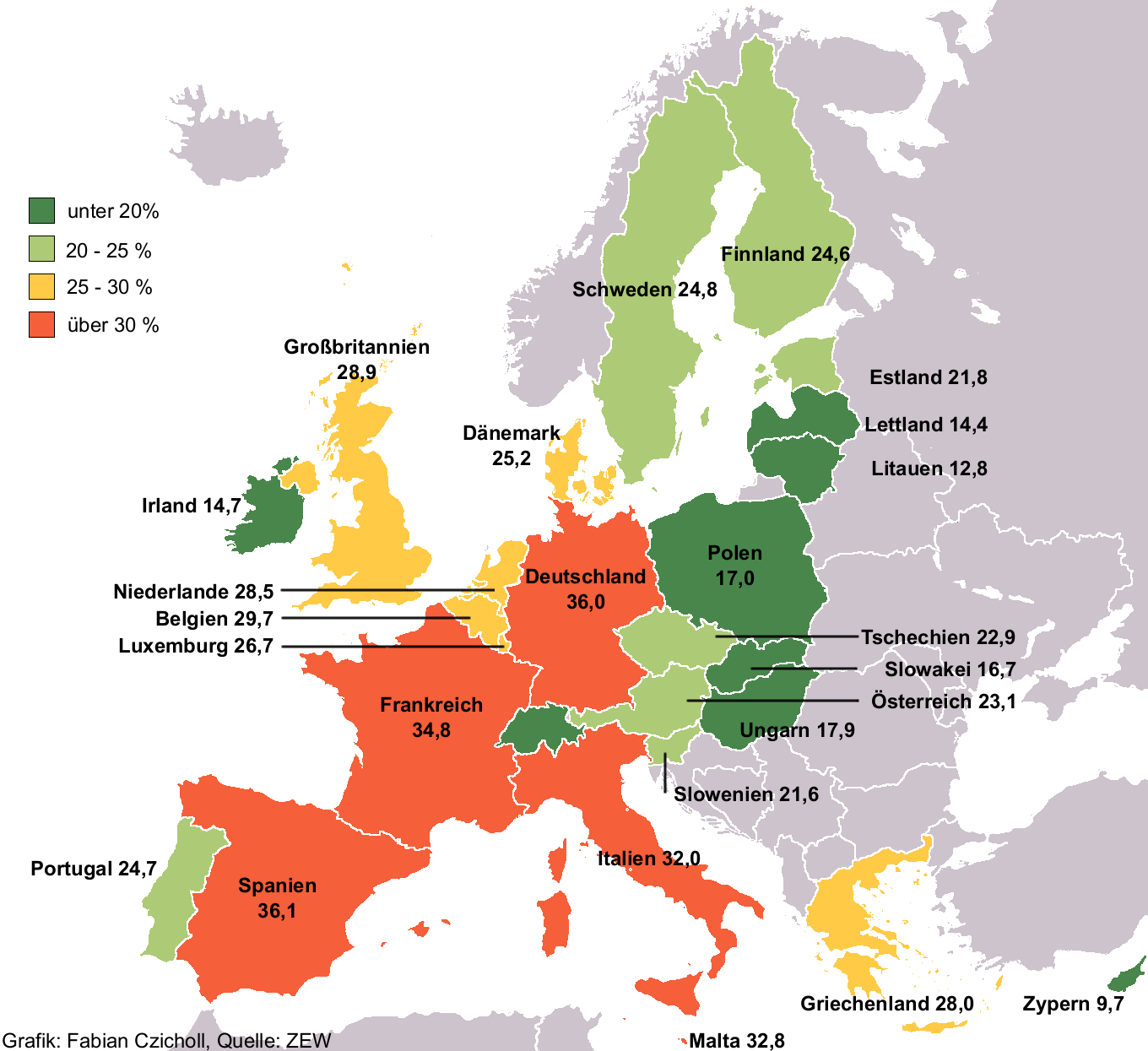 unternehmenssteuersaetze EU25 + Schweiz